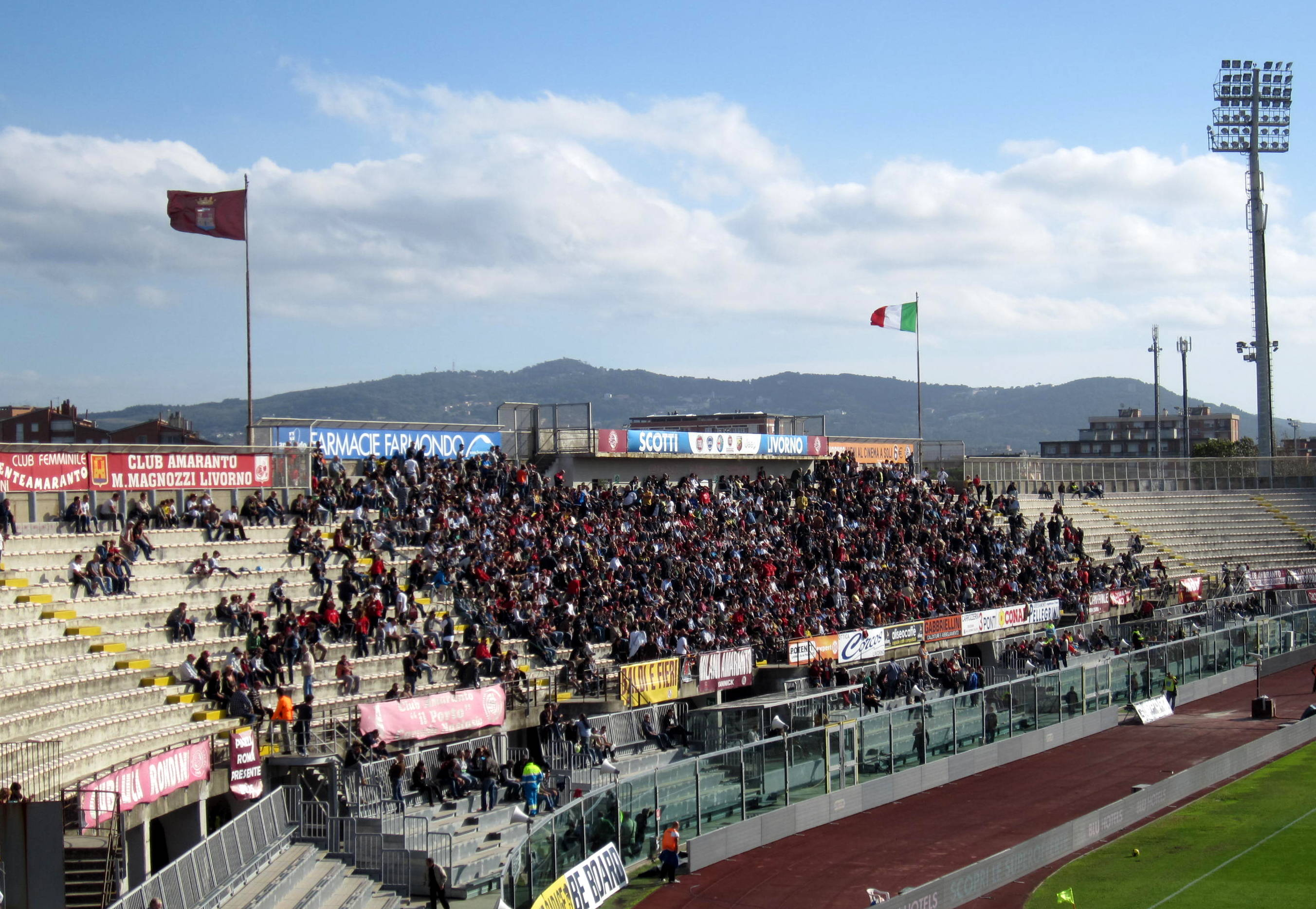 Gradinata allo Stadio Armando Picchi di Livorno